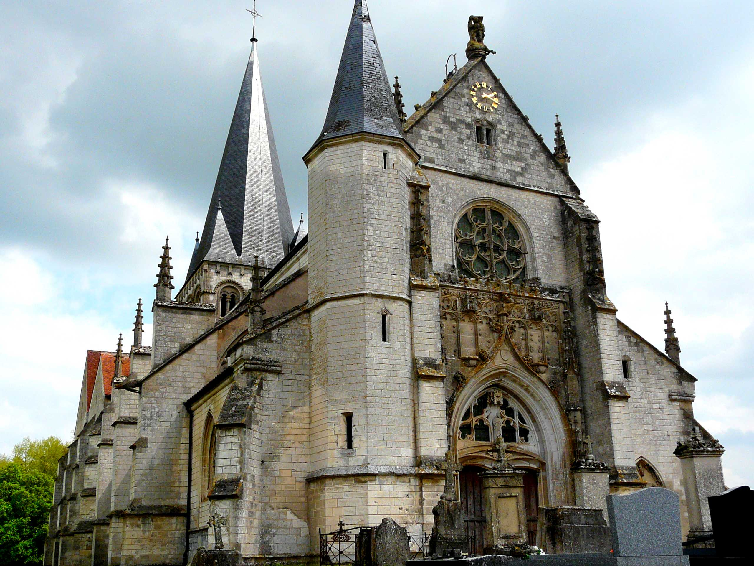 Église Sainte-Tanche (Classé) .